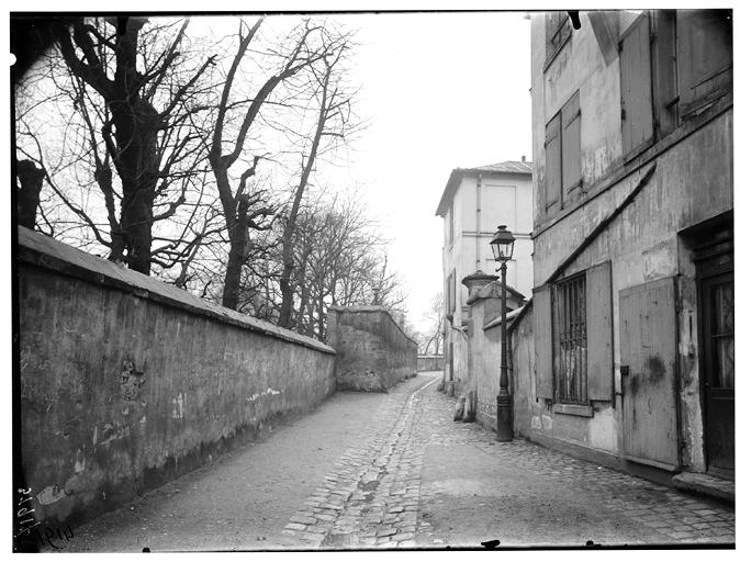 Vue générale de la rue